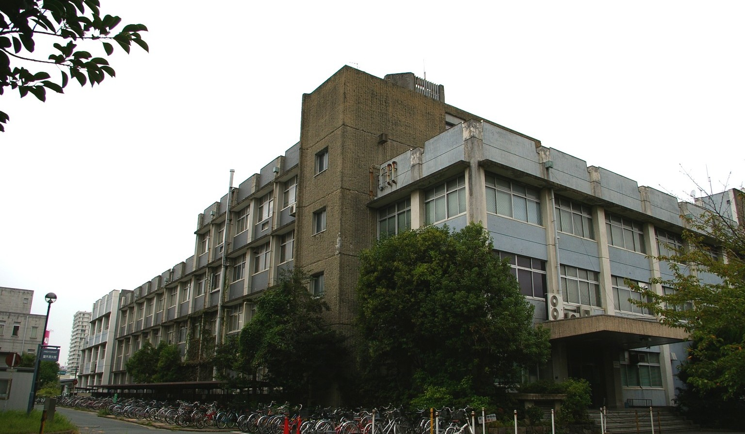 2008年福岡市内で火国男児 (talk)が撮影。